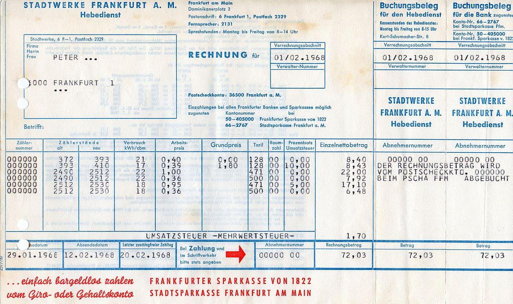 Rechnung des Hebedienstes der Stadtwerke Frankfurt am Main aus dem Jahre 1968, bereits mit EDV erstellt